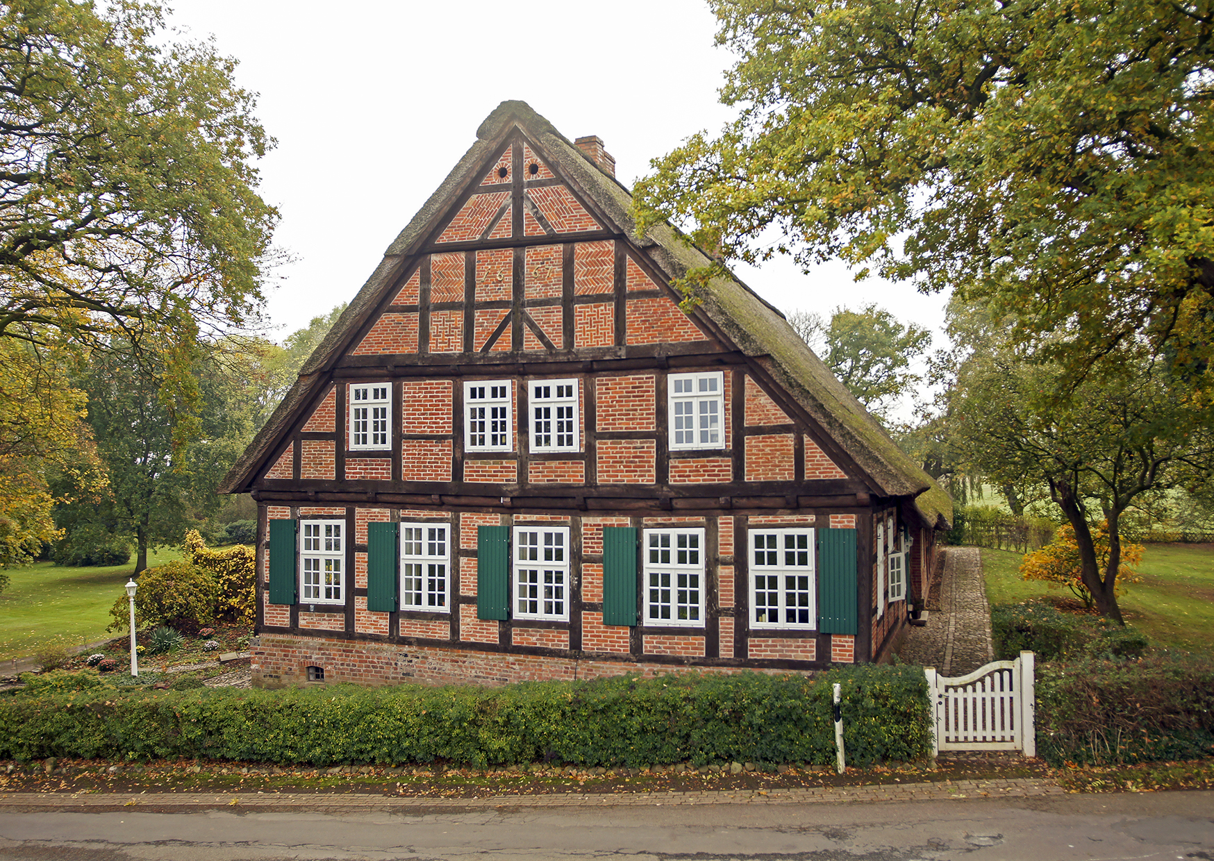 Spiegelhof in Bremen, Lesumbroker Landstraße 220Das abgebildete Objekt ist ein geschütztes Kulturdenkmal in der Freien Hansestadt Bremen, mit der Nr. 1298 beim Landesamt für Denkmalpflege registriert.